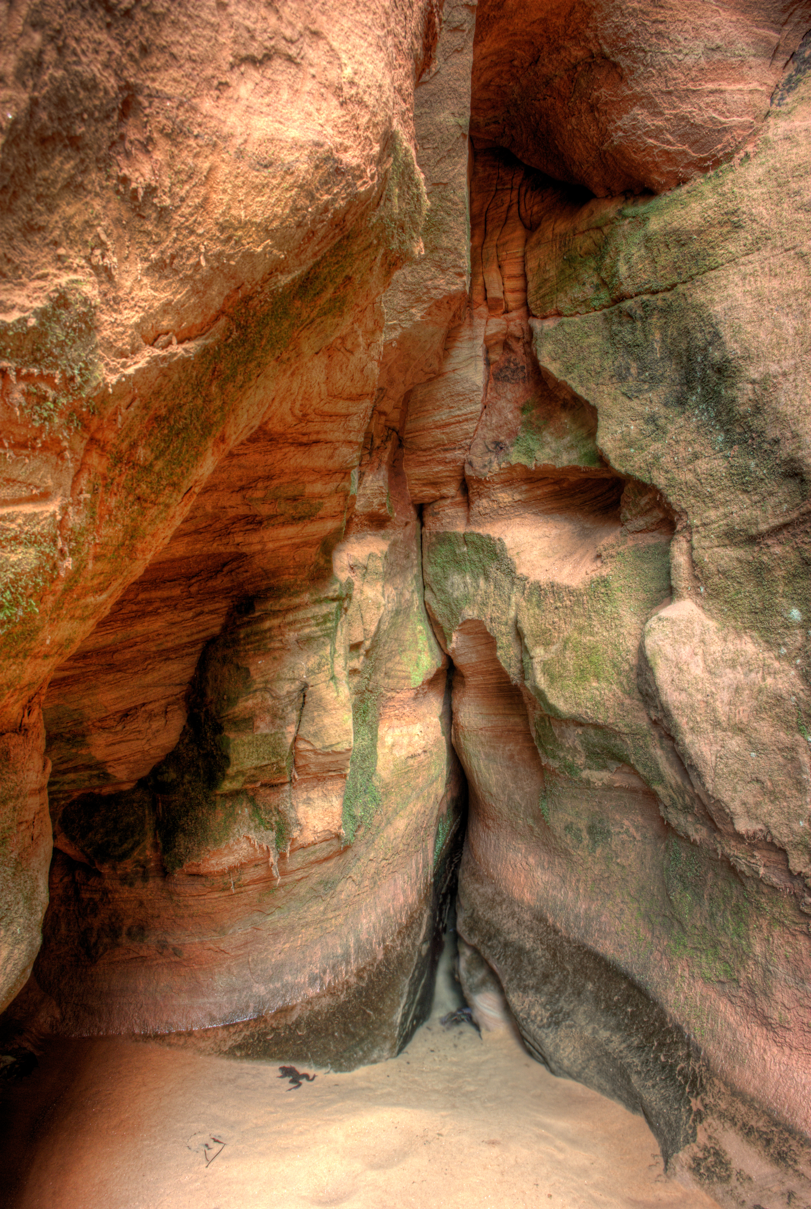 Merioone allikas Tilleoru matkarajal. Väga selge ja külma veega kiirevooluline allikas. Pildistamise ajal pidasid konnad allika suudmes pulmi.